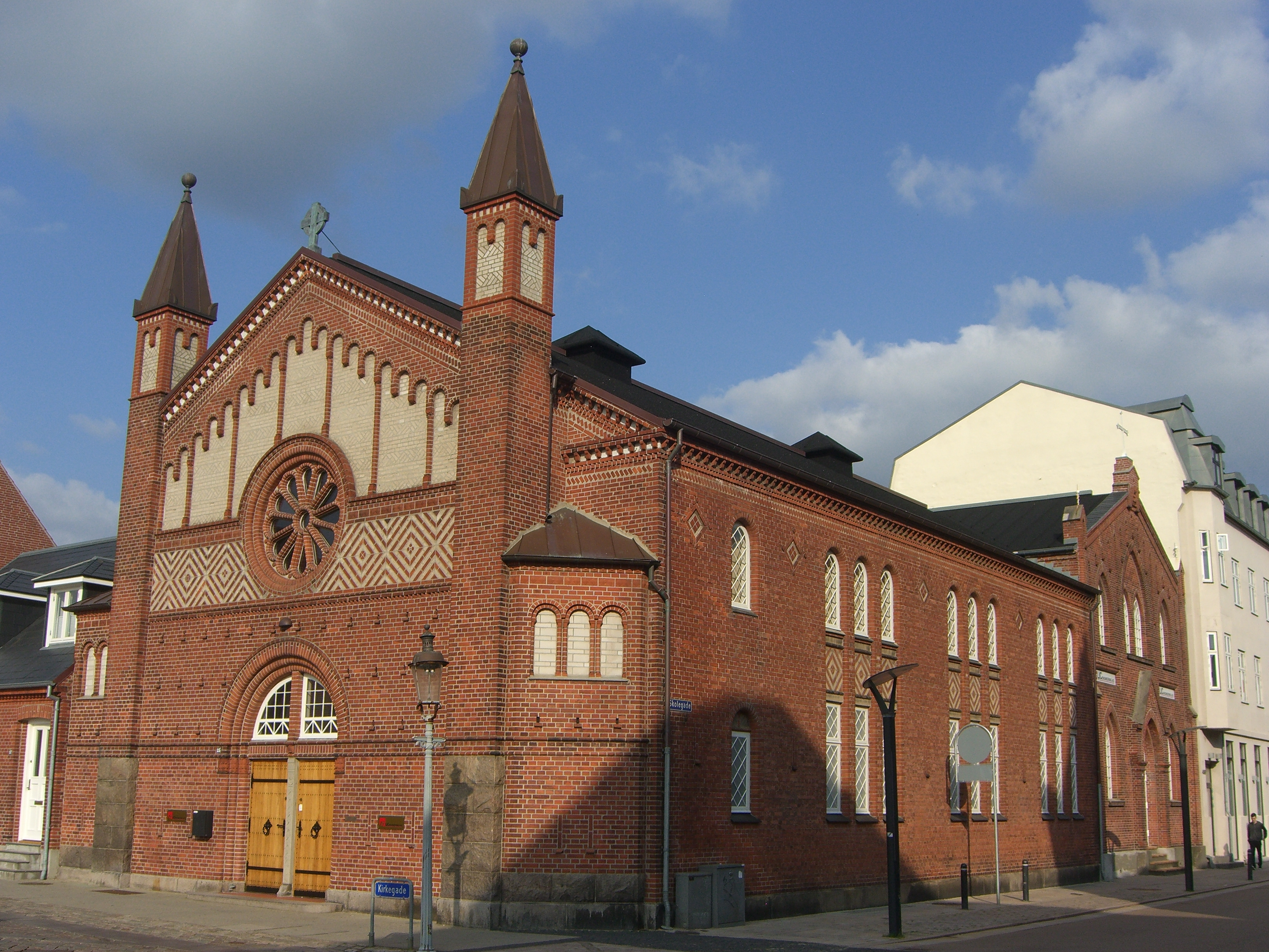 Missionshuset Bethania, Esbjerg, Danmark